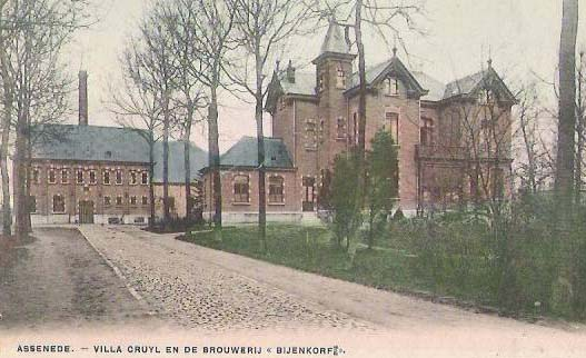 Brouwerij De Bijenkorf - Assenede - Oost-Vlaanderen - Vlaanderen - België